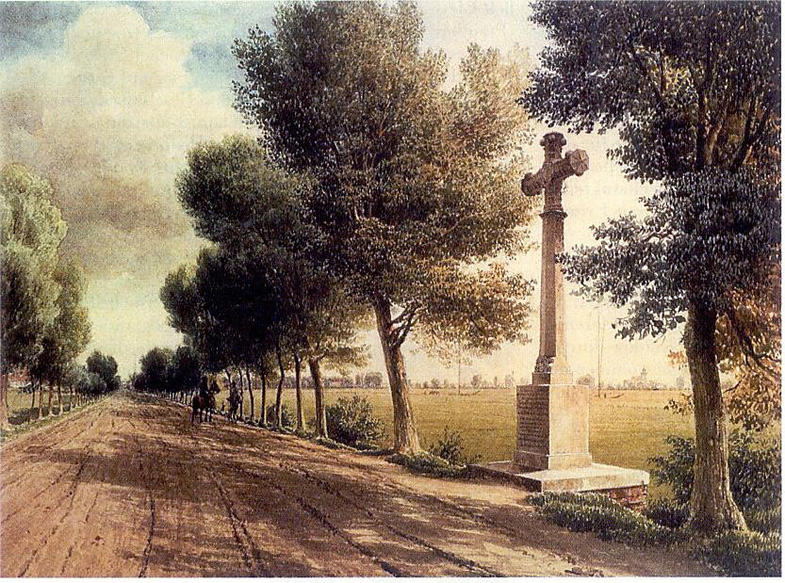 „Kreuz am Kremmer Damm“, 1848. Potsdam/Stiftung Schlösser und Gärten